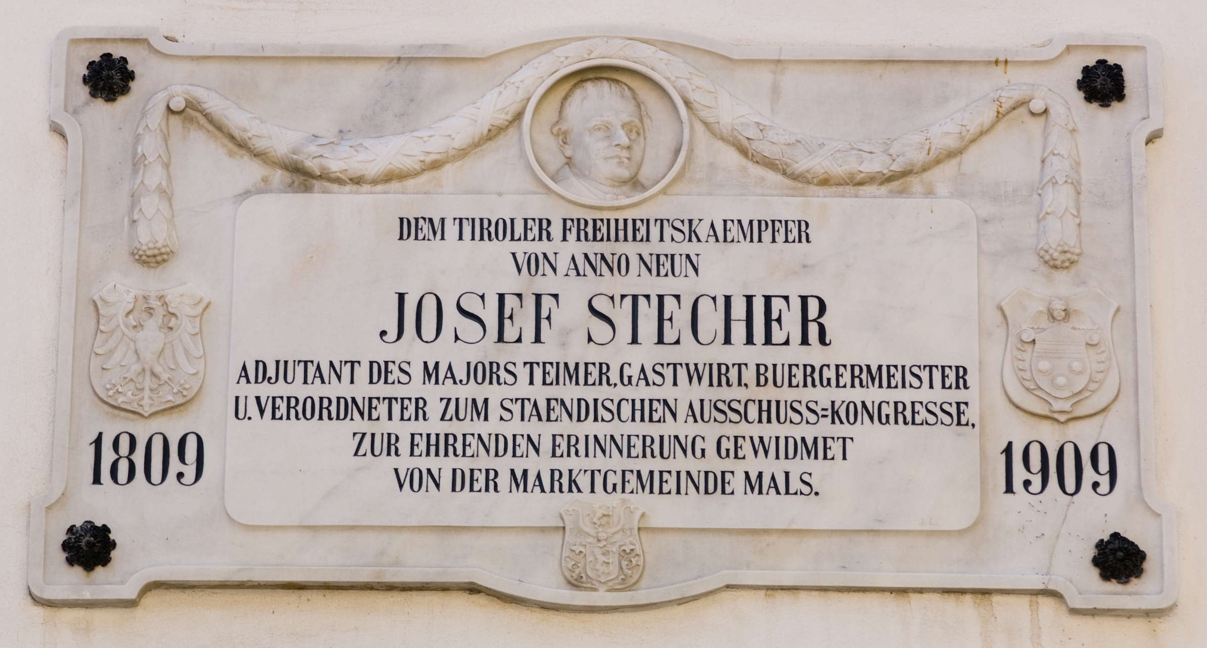 Gedenktafel in Laaser Marmor anlässlich der Feierlichkeiten 1809-1909 in Mals, Gasthof zum Hirschen